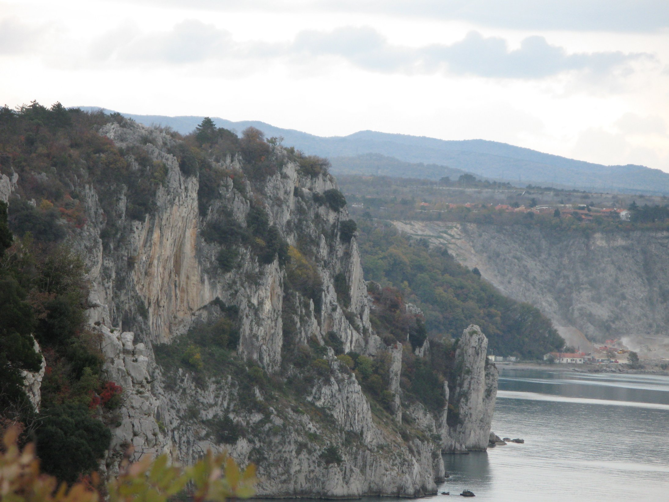 Slika predstavlja skalno pečino